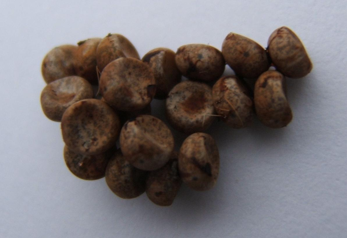 Actias maenas ova. Taken by Shawn Hanrahan.